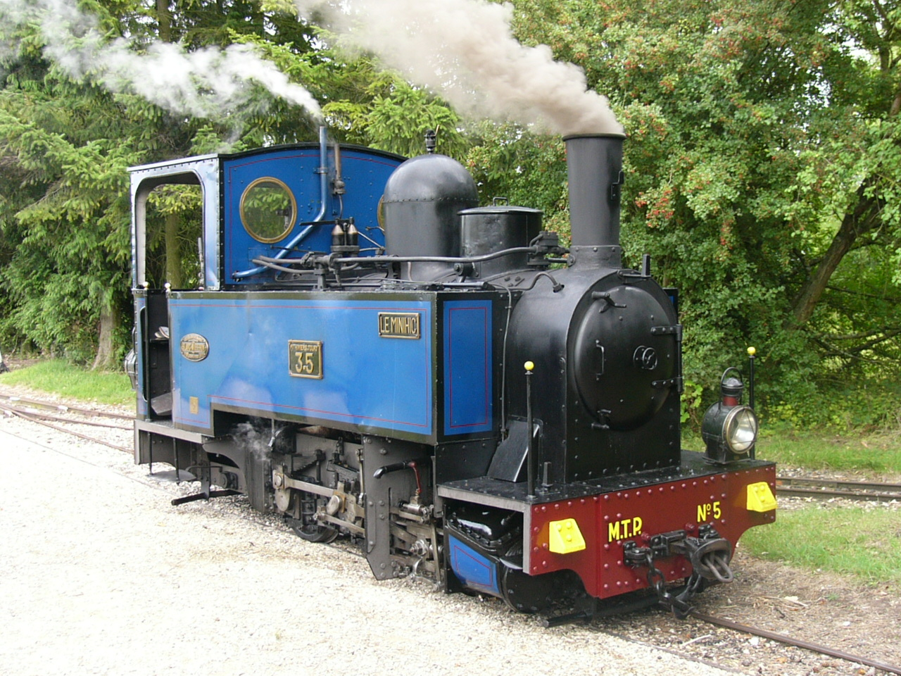 Locomotive 030T Blanc-Misseron au bois de Bellébat